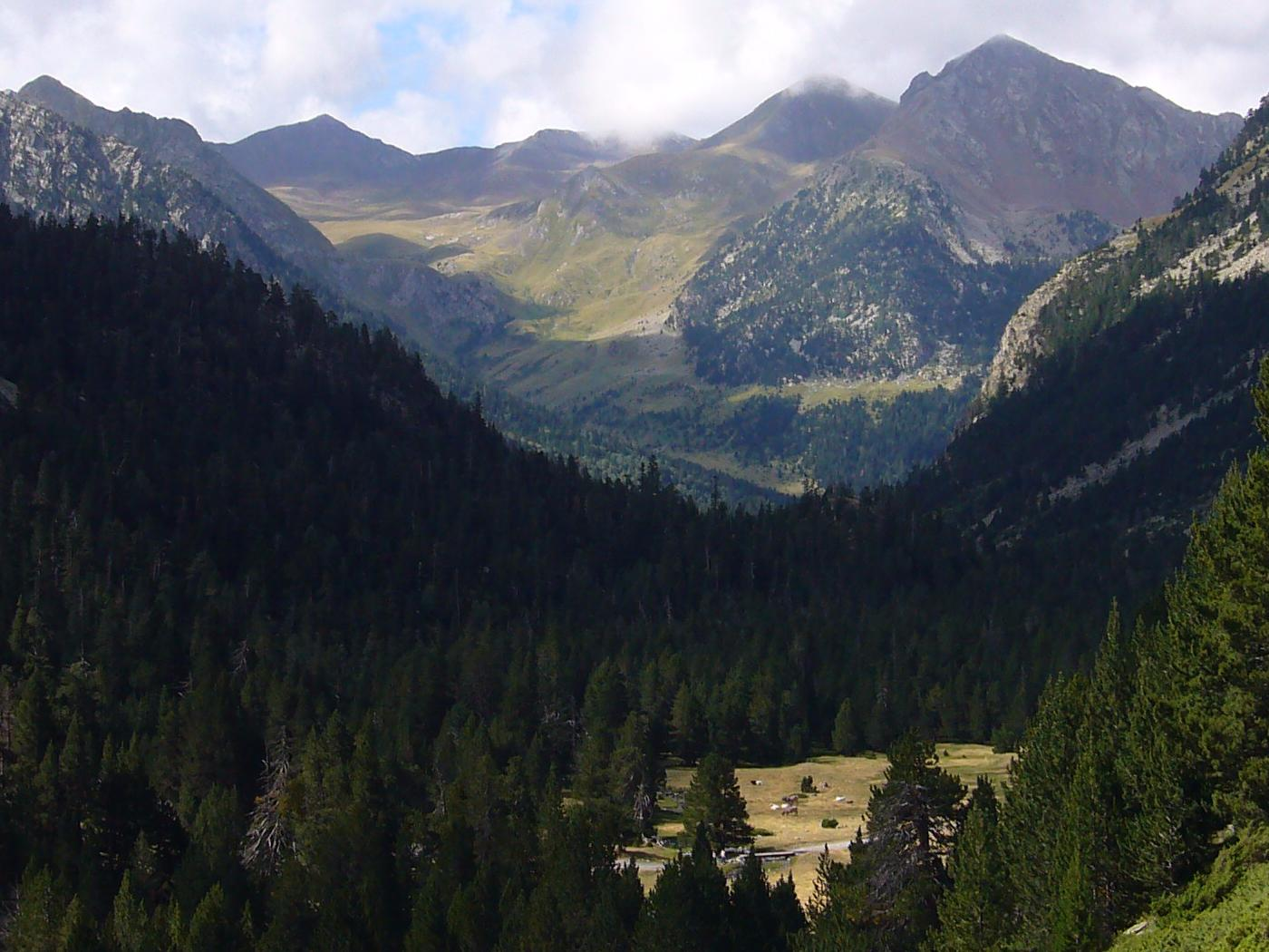 Montanyó de Llacs vist des del Barranc de Contraix; la Vall de Boí, Alta Ribagorça, Catalunya